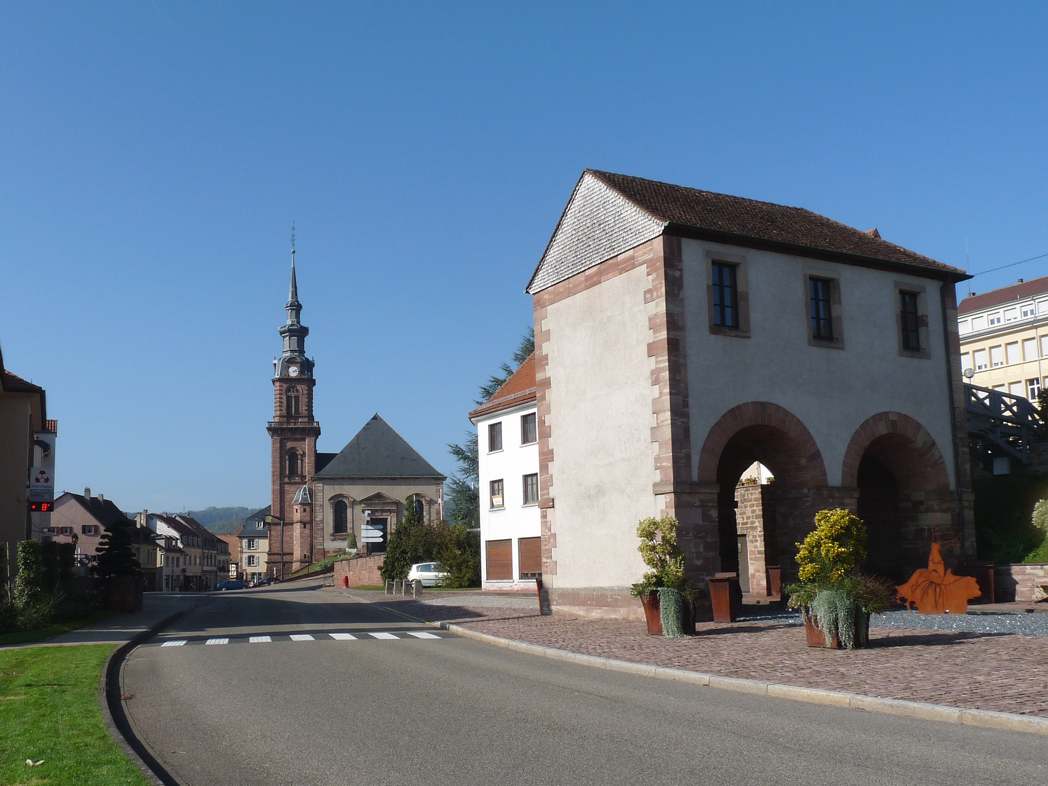 Bitche : Porte de Strasbourg